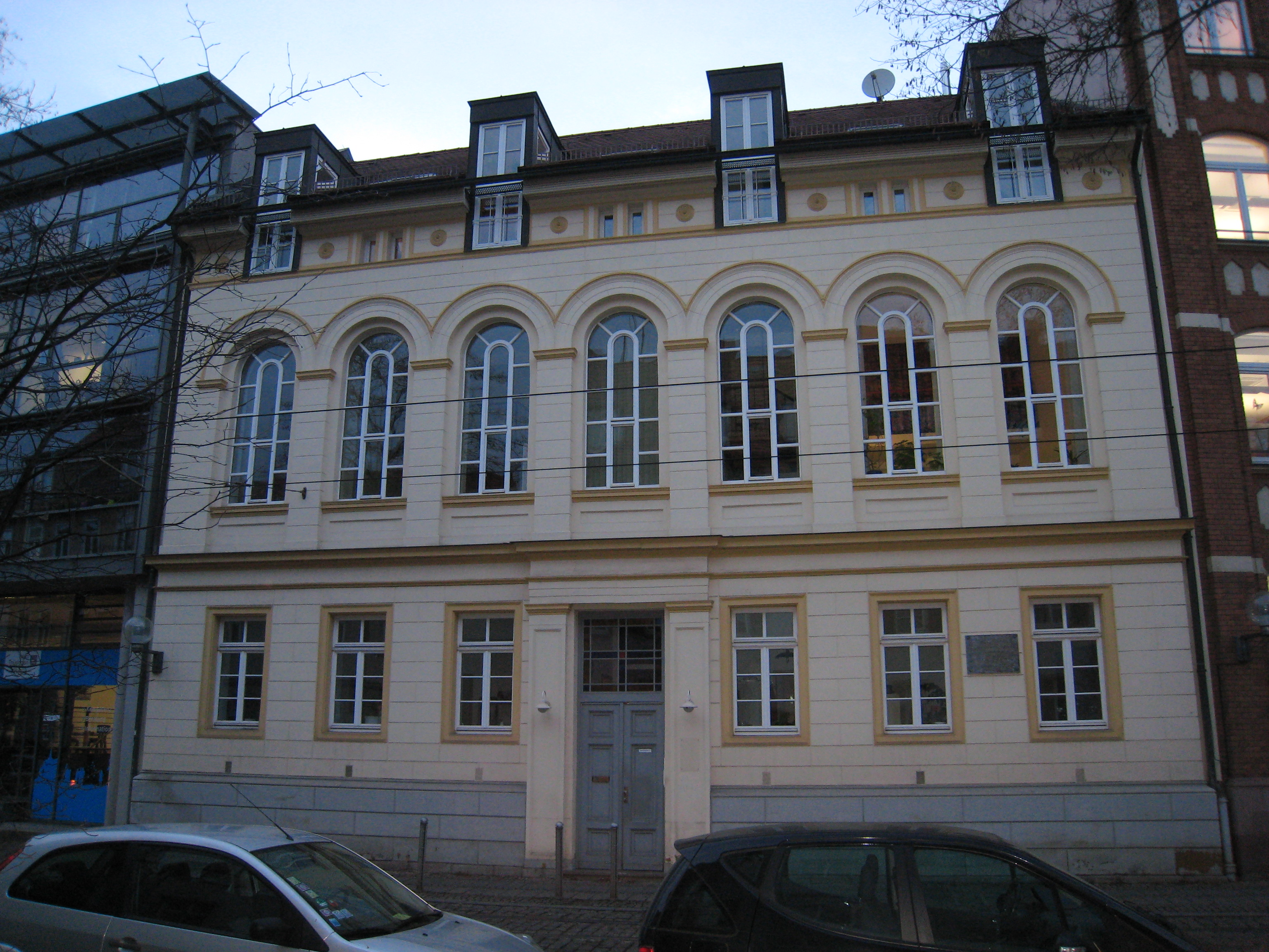 Collegium Marianum Erfurt, Mainzerhofstraße 11